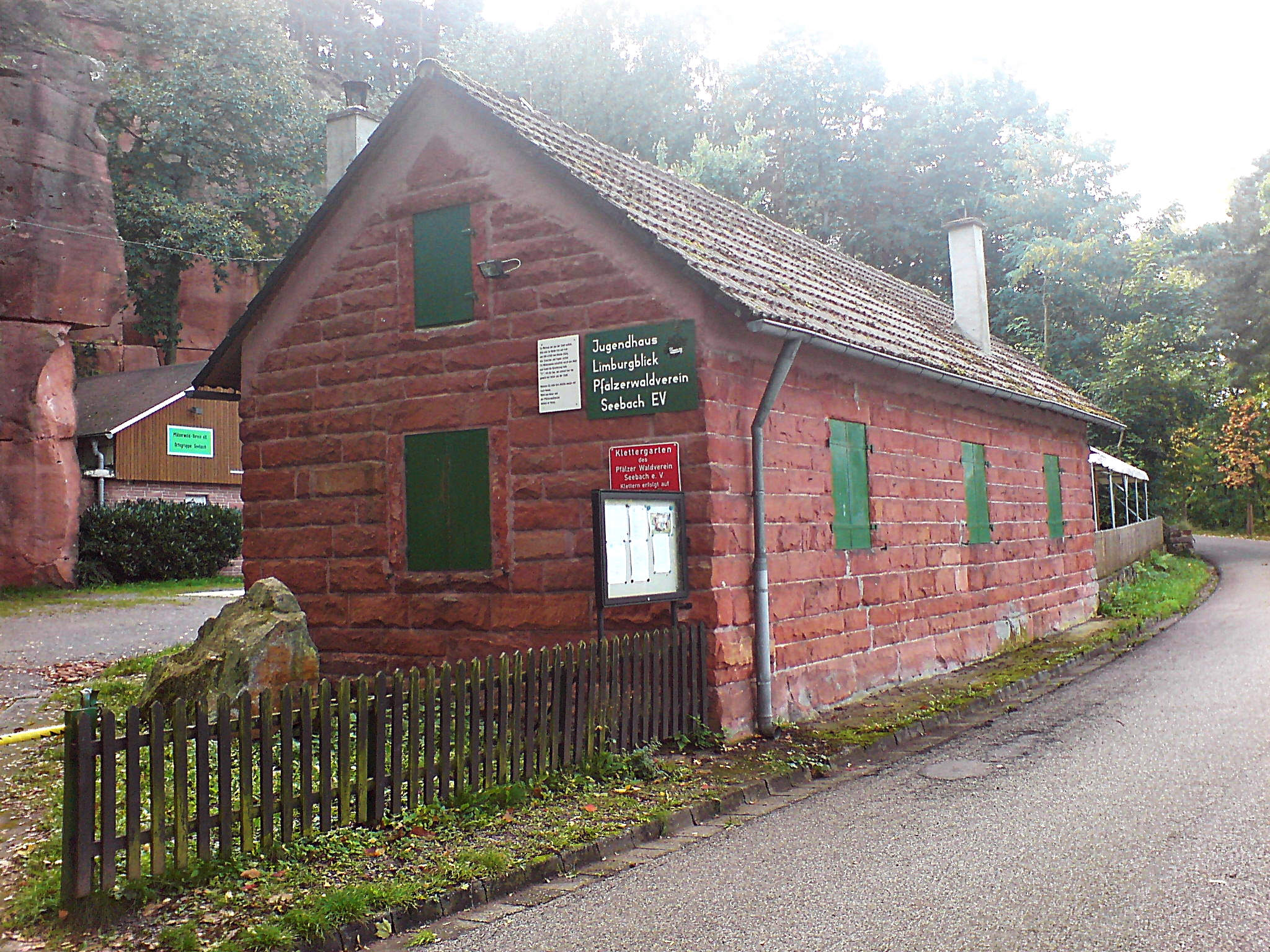 Das Jugendhaus Limburgblick des PWV Seebach.